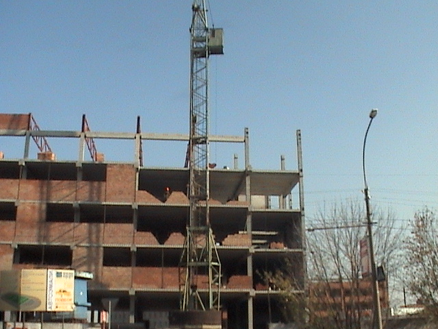 КБ-160 - нижняя часть крана